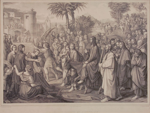 „Der Einzug Christi in Jerusalem“ nach dem gleichnamigen Gemälde von Friedrich Overbeck.